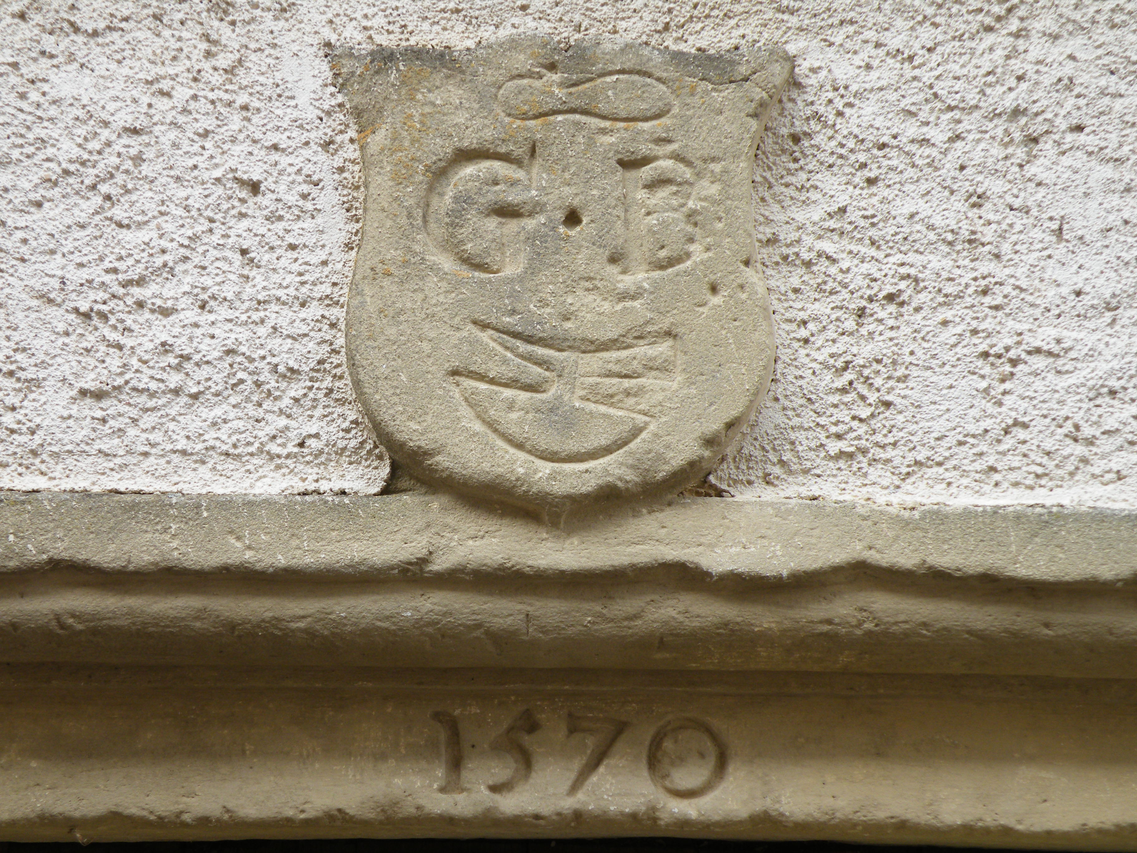 écu surmontant la porte de la Maison du cordonnier Châtillon-sur-Saône-Vosges.